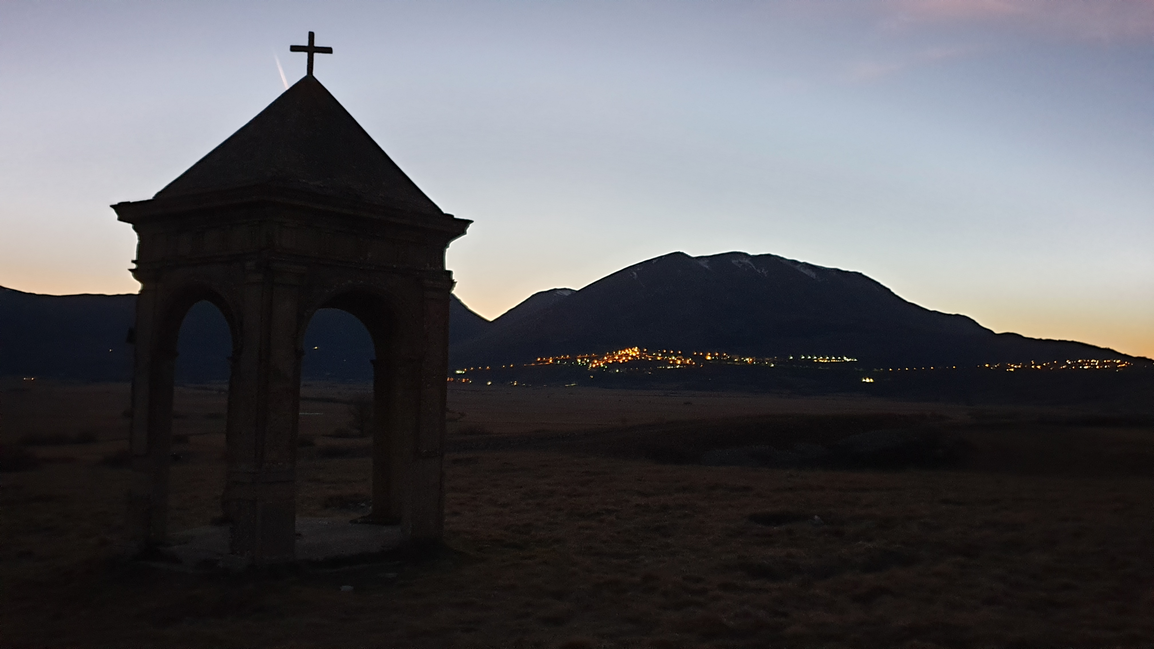 Rocca di Cambio (AQ): Palco della Rimembranza